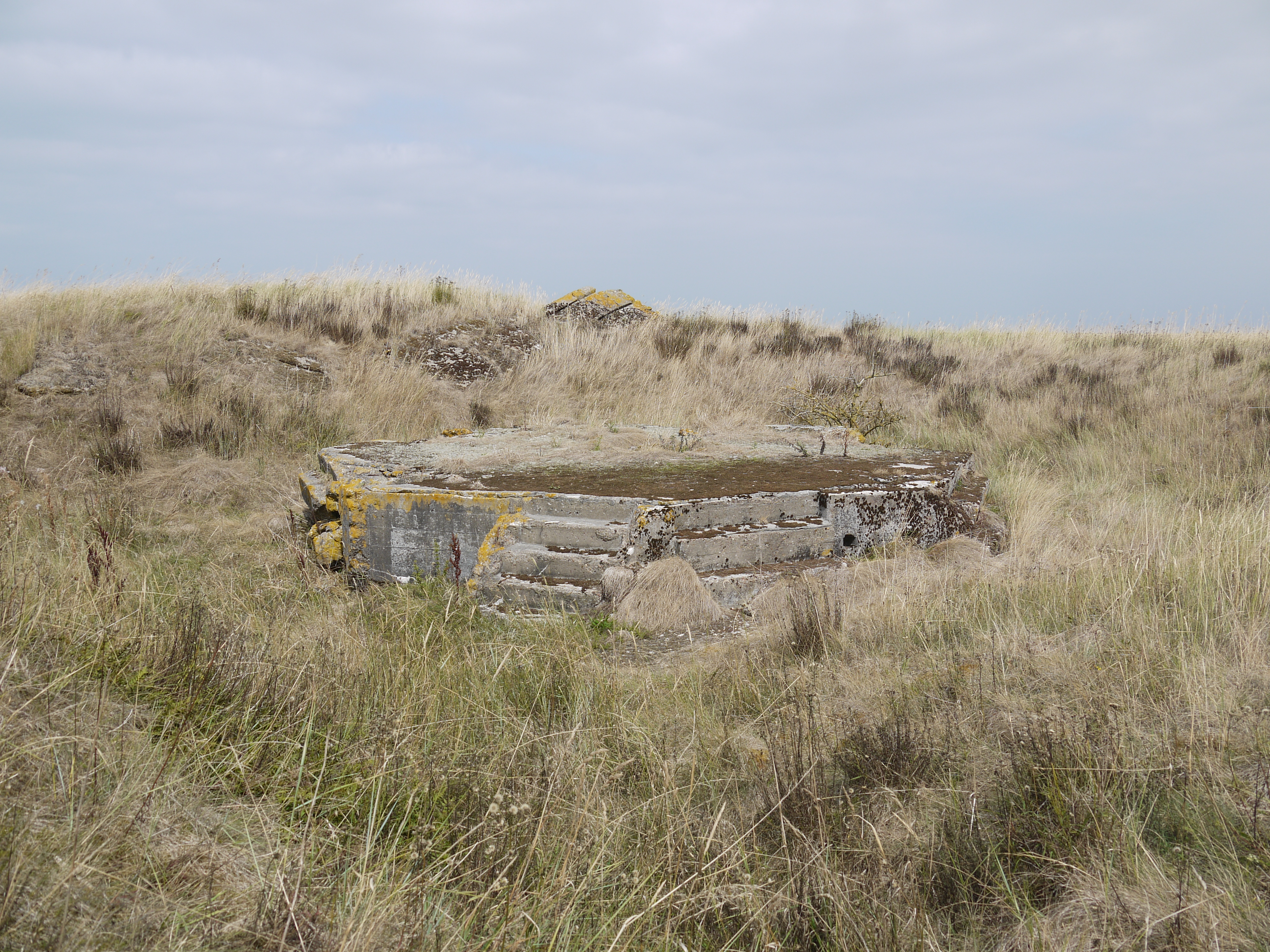 Geschützbettung Mellum